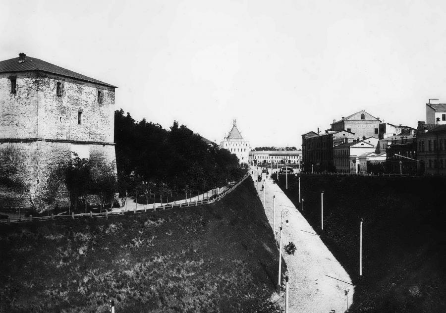 Никольская башня Нижегородского кремля